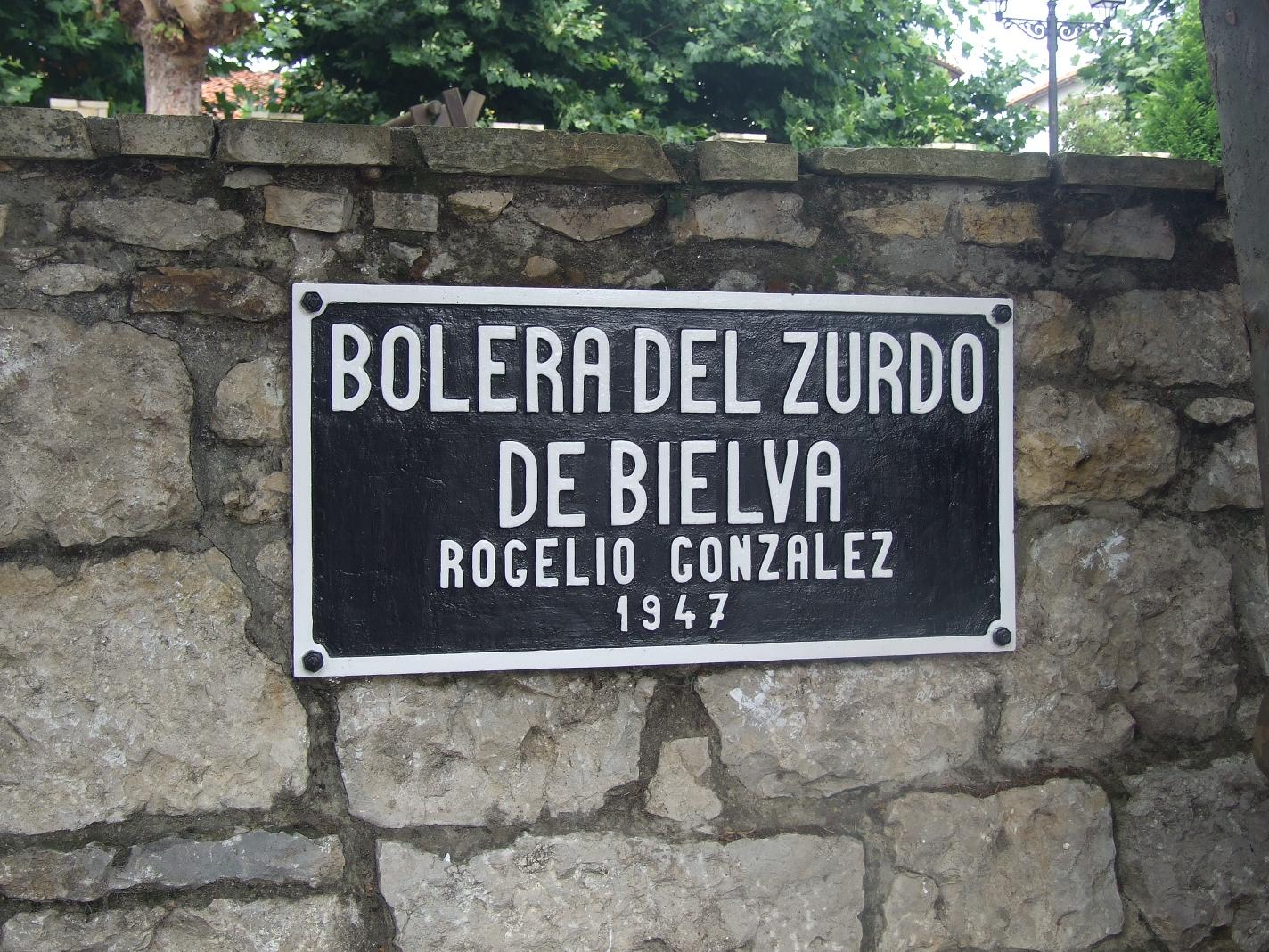 Bolera en honor de Rogelio González Vinoles, el Zurdo de Bielva, situada en Bielva, Cantabria, España.